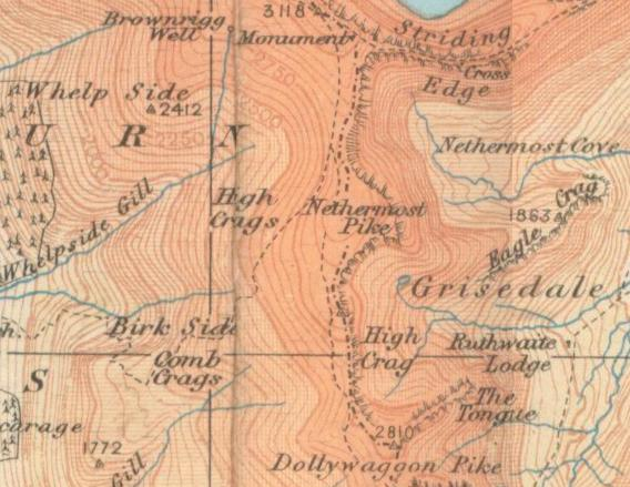 old OS map